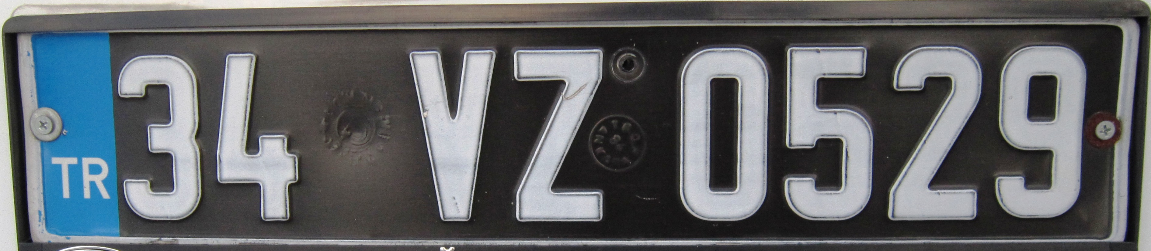 Overheids kentekenplaat (34 - Istanboel) Turkije